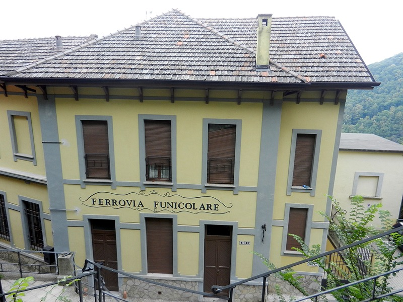 Santa Maria del Monte (Varese) - Stazione della Funicolare del Sacro Monte